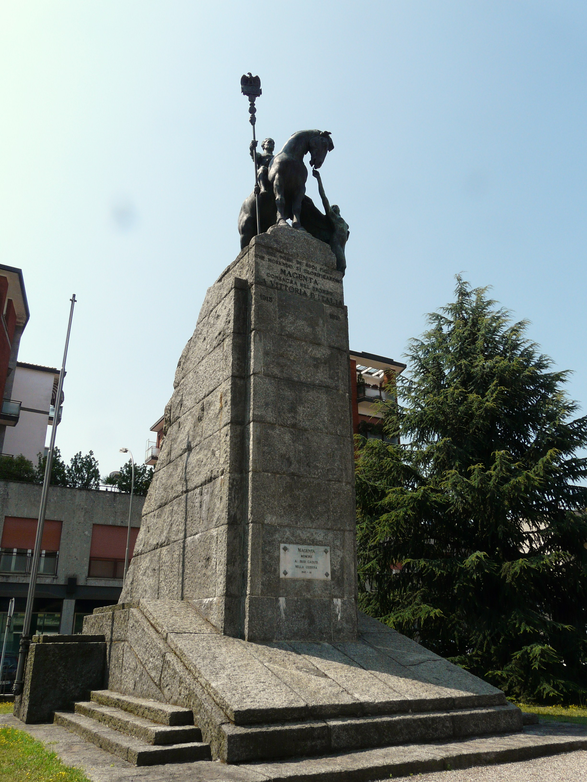 Monumento ai caduti, Magenta, Lombardia, Italia